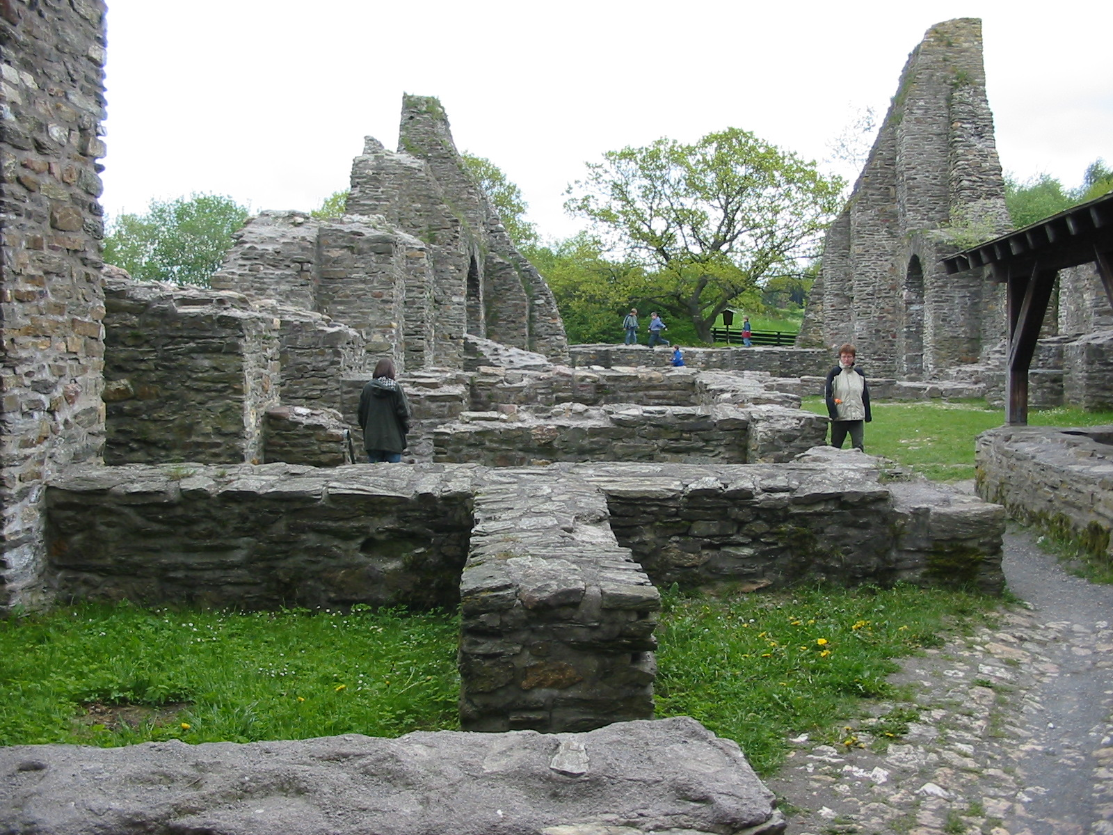 Bildbeschreibung: Burg Baldenau Quelle: selbst fotografiert Fotograf: Lokilech Datum: siehe Metadaten